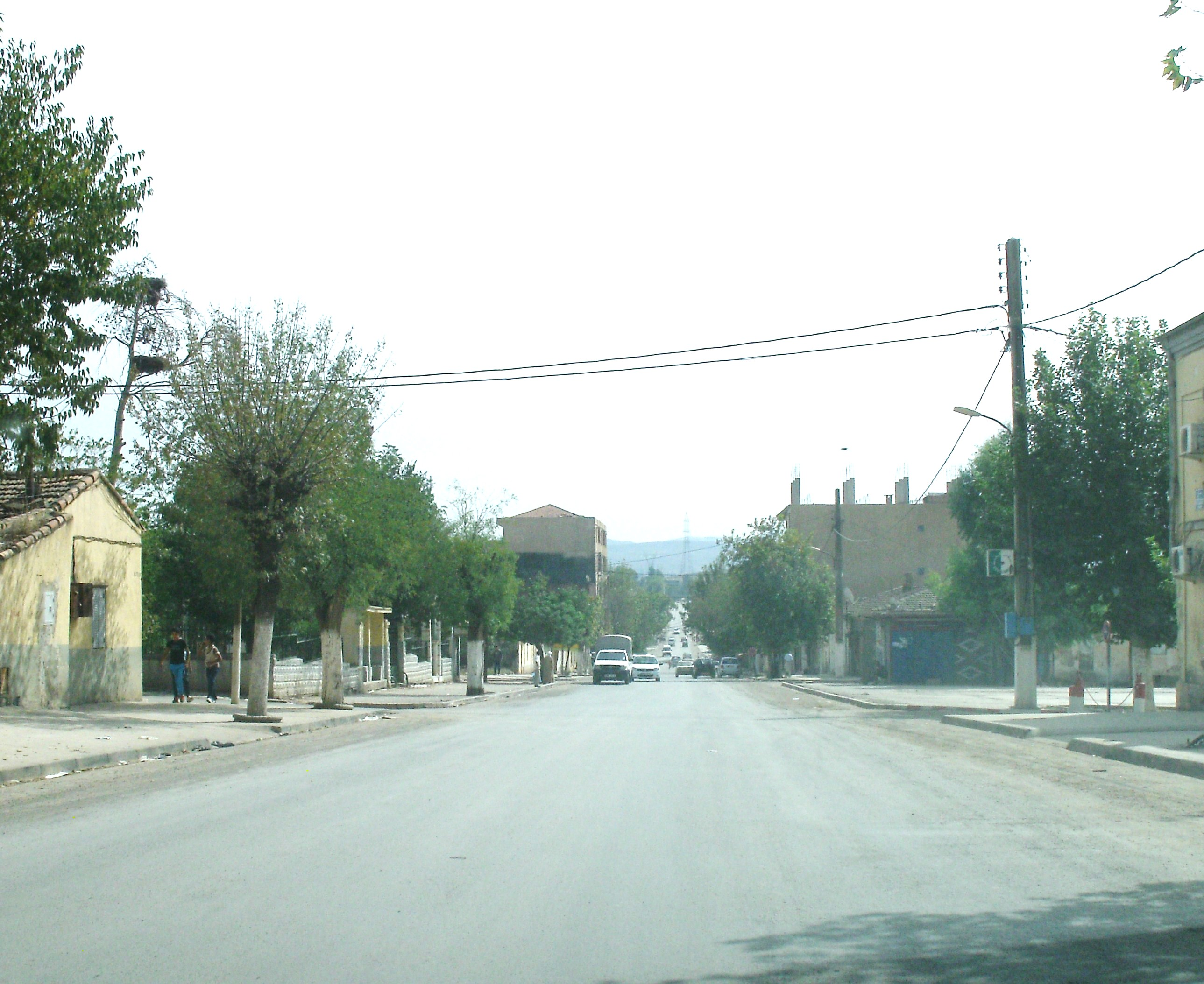 Bir Ghbalou dans la Wilaya de Bouira